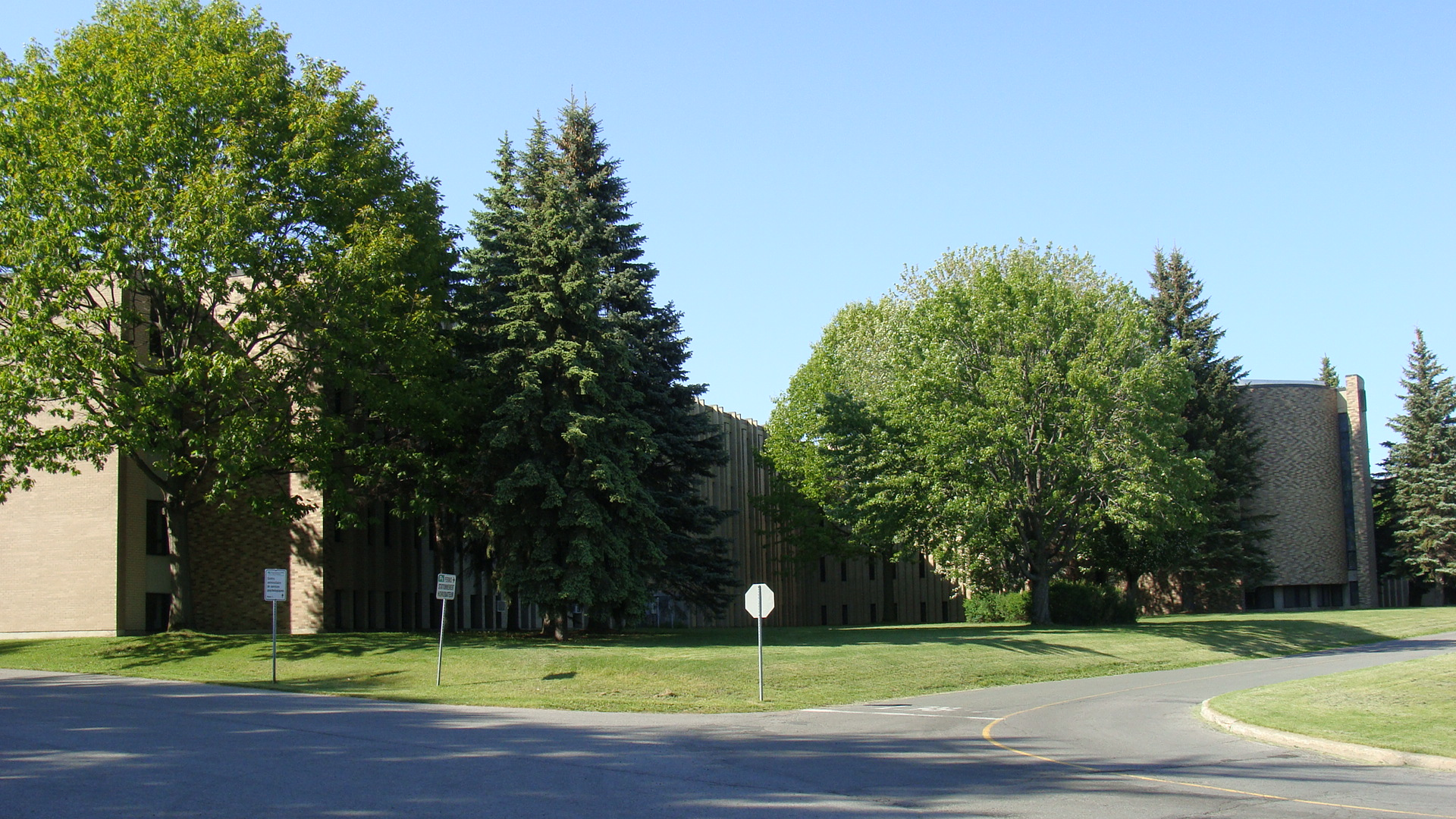 Pavillon Michel Sarrazin de l'Université du Québec à Trois-Rivières, au Québec (Canada).